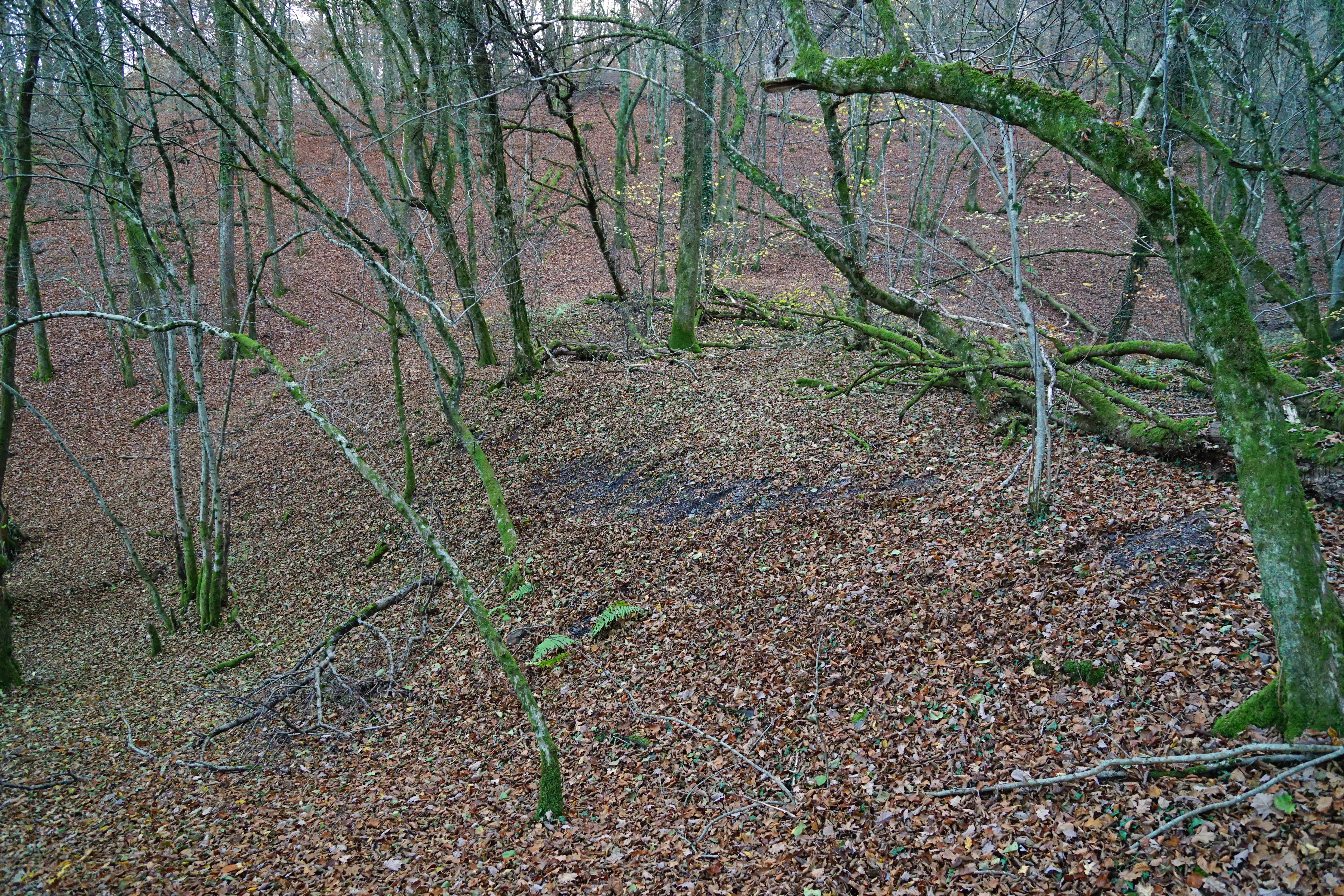 Le terril du puits creusé dans la forêt d'Arsot, au bord de l'étang d'Autruche par monsieur Carandal.